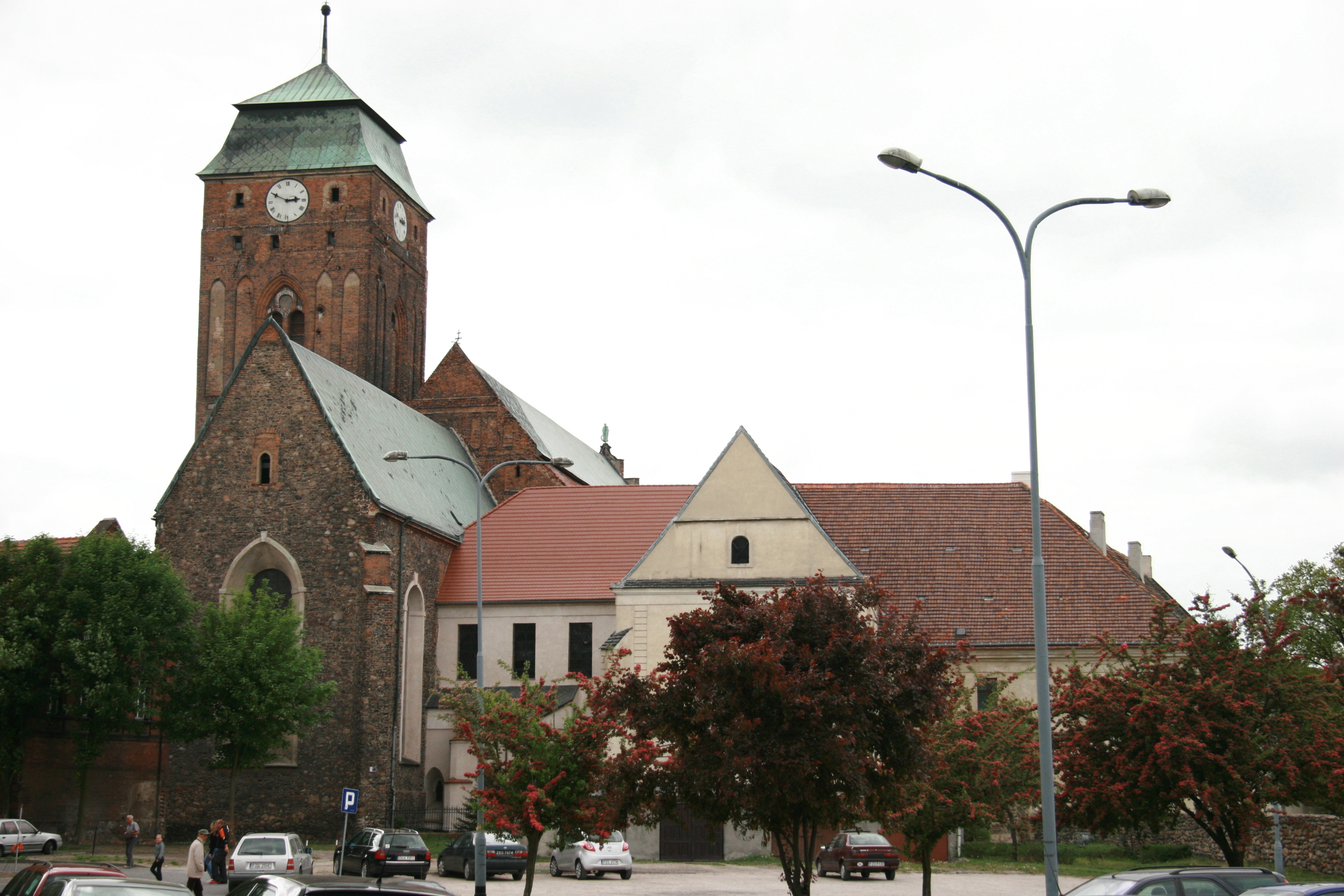 Żagań, pl. Kościelny - zespół klasztorny augustianów, XIV-XVIII w. (zabytek nr L-99/1-4/A z 12.06.1953 i z 5.06.1961)